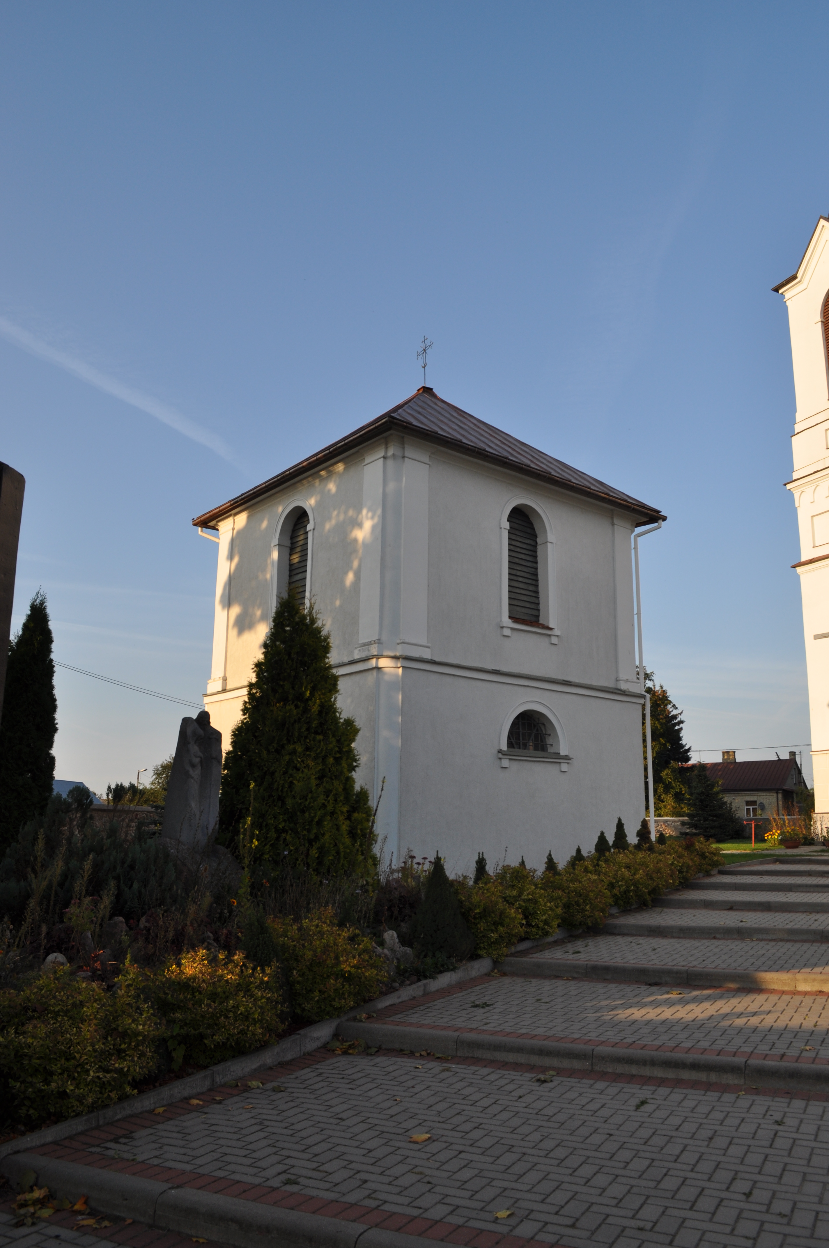 Dzwonnica przy kościele p.w.Jana Chrzciciela w Nowym Dworze, gmina Nowy Dwór, powiat sokólski 10.1966.